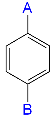 Para-positie op aromaat